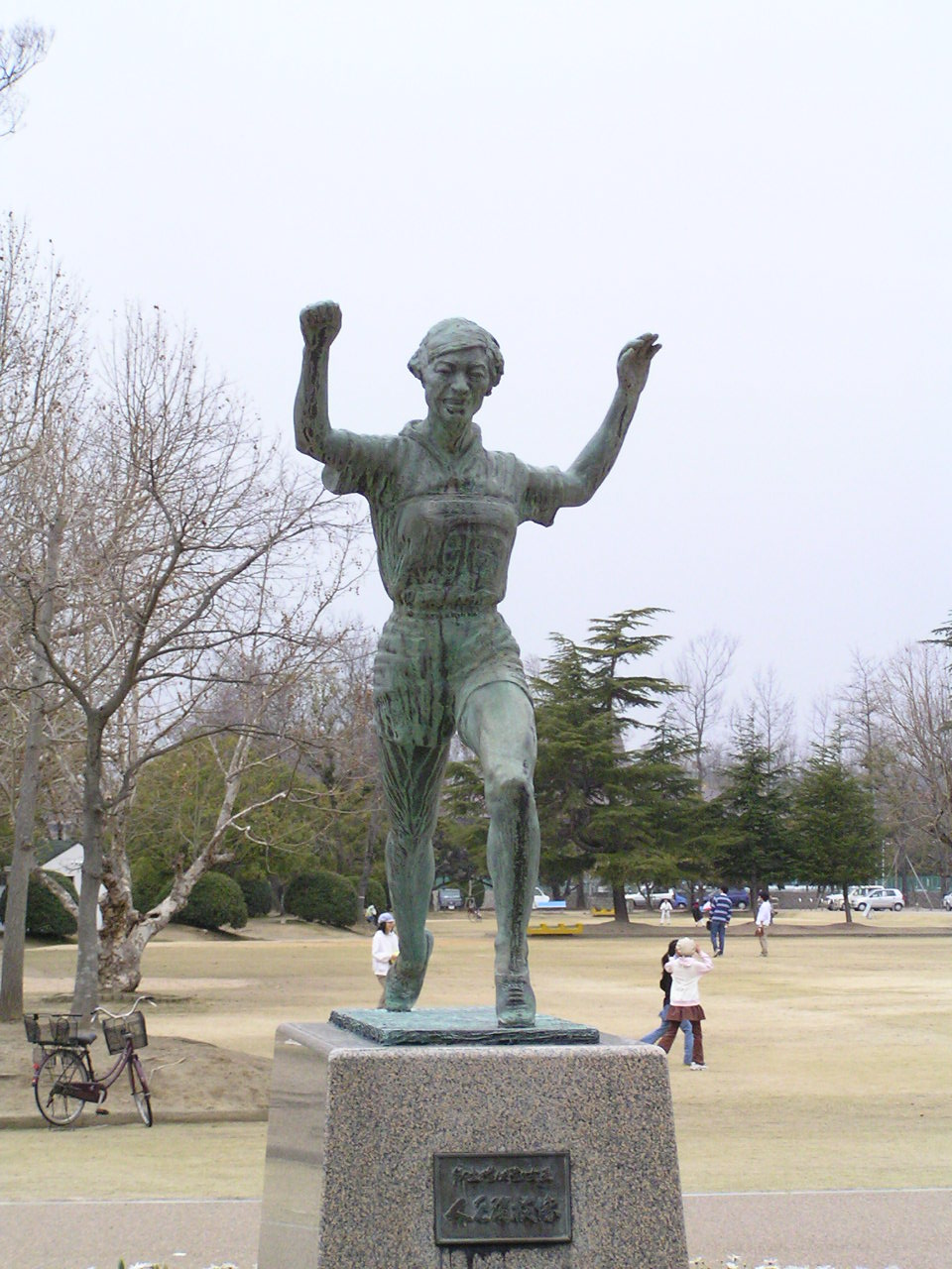 Kinue Hitomi